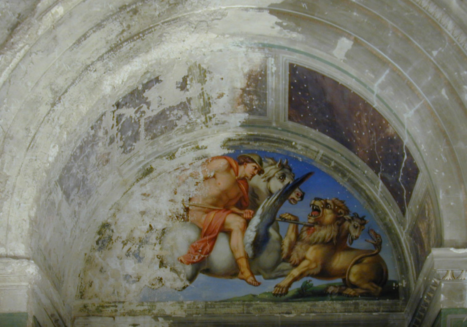 Bellerophon tötet die Chimäre.